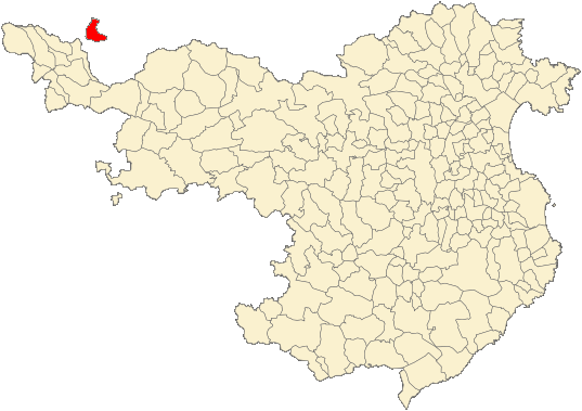 Municipio de Llívia/Llivia respecto a la provincia de Gerona (España)